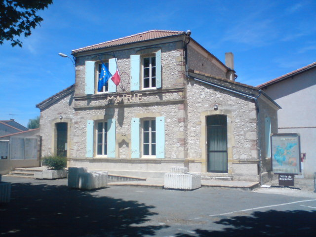 Mairie de Roquefort (47)